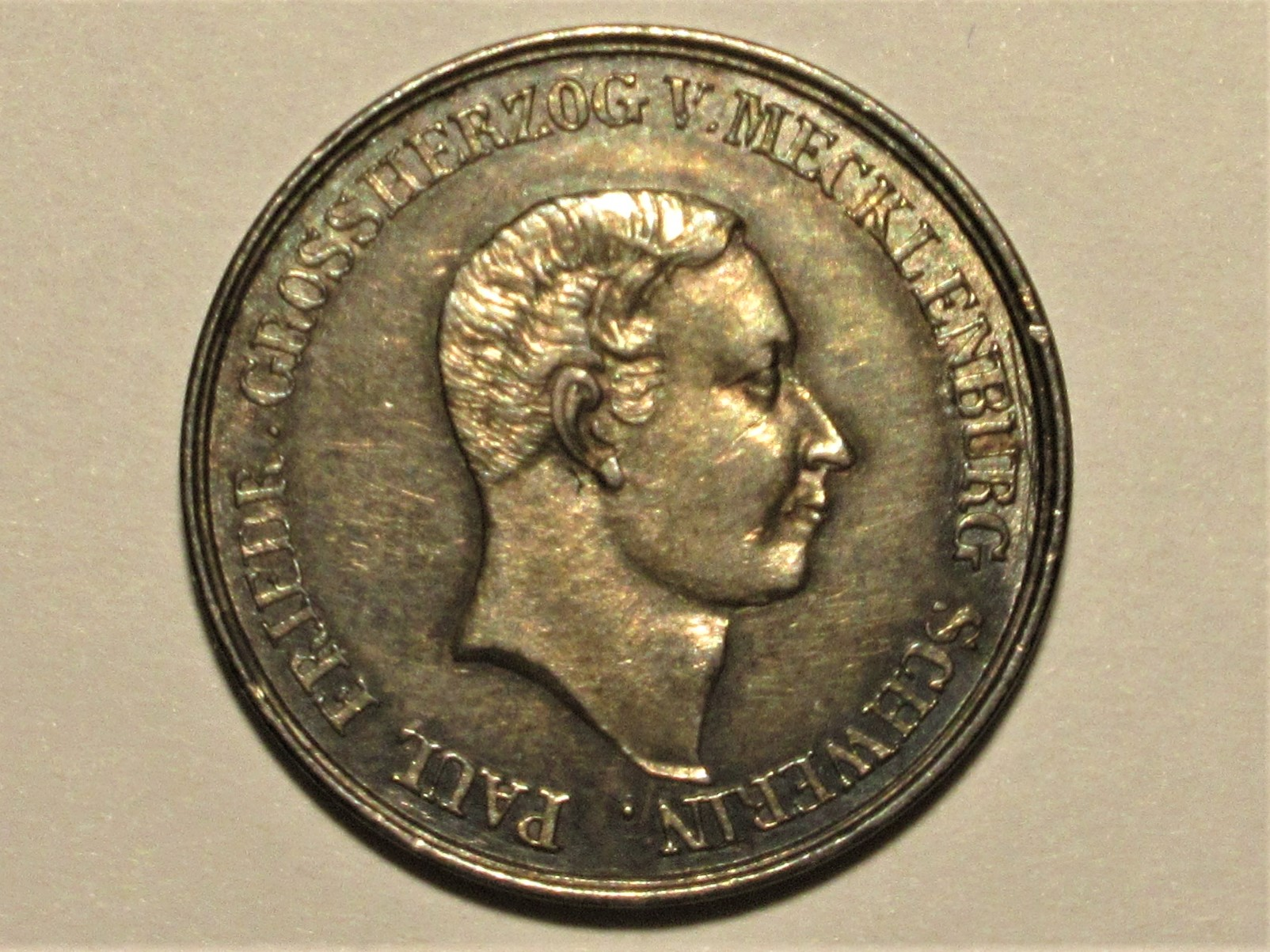 Gedenkmünze auf den Tod Paul Friedrichs 1842, AKS 36